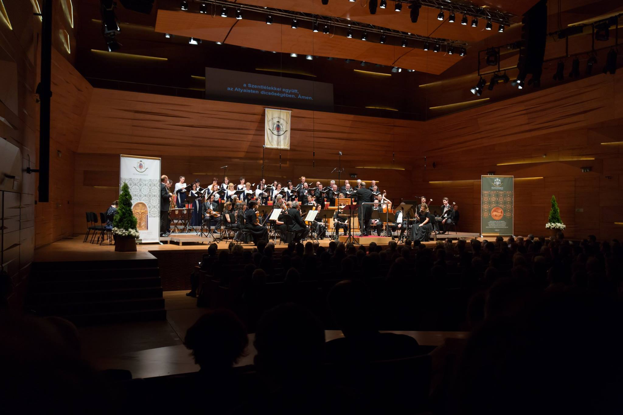 Con Spirito — Egyházzenei Fesztivál zárókoncertje a pécsi Kodály Központban